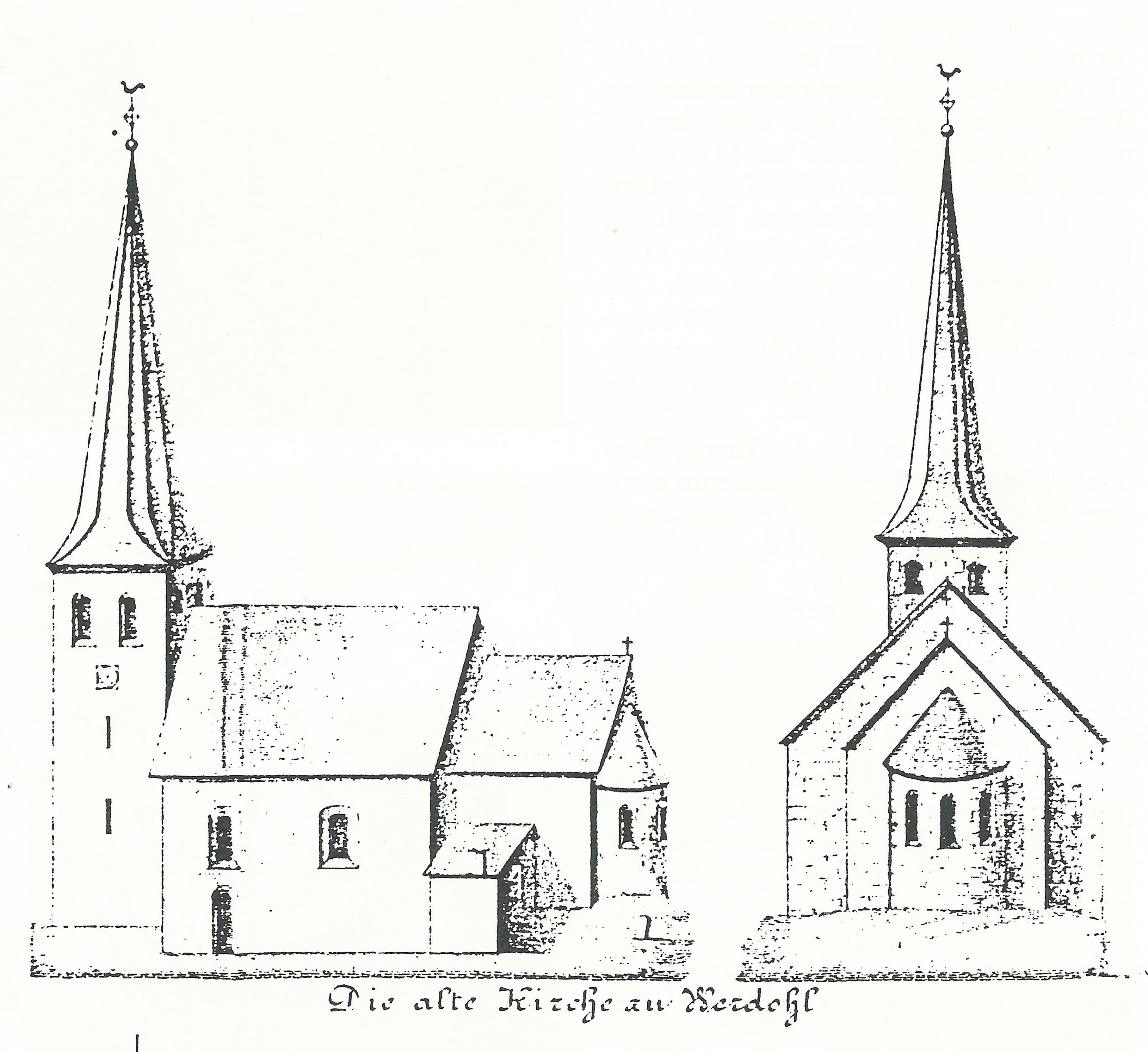 Die Alte Kilianskirche in Werdohl, Darstellung aus der Zeit vor 1847